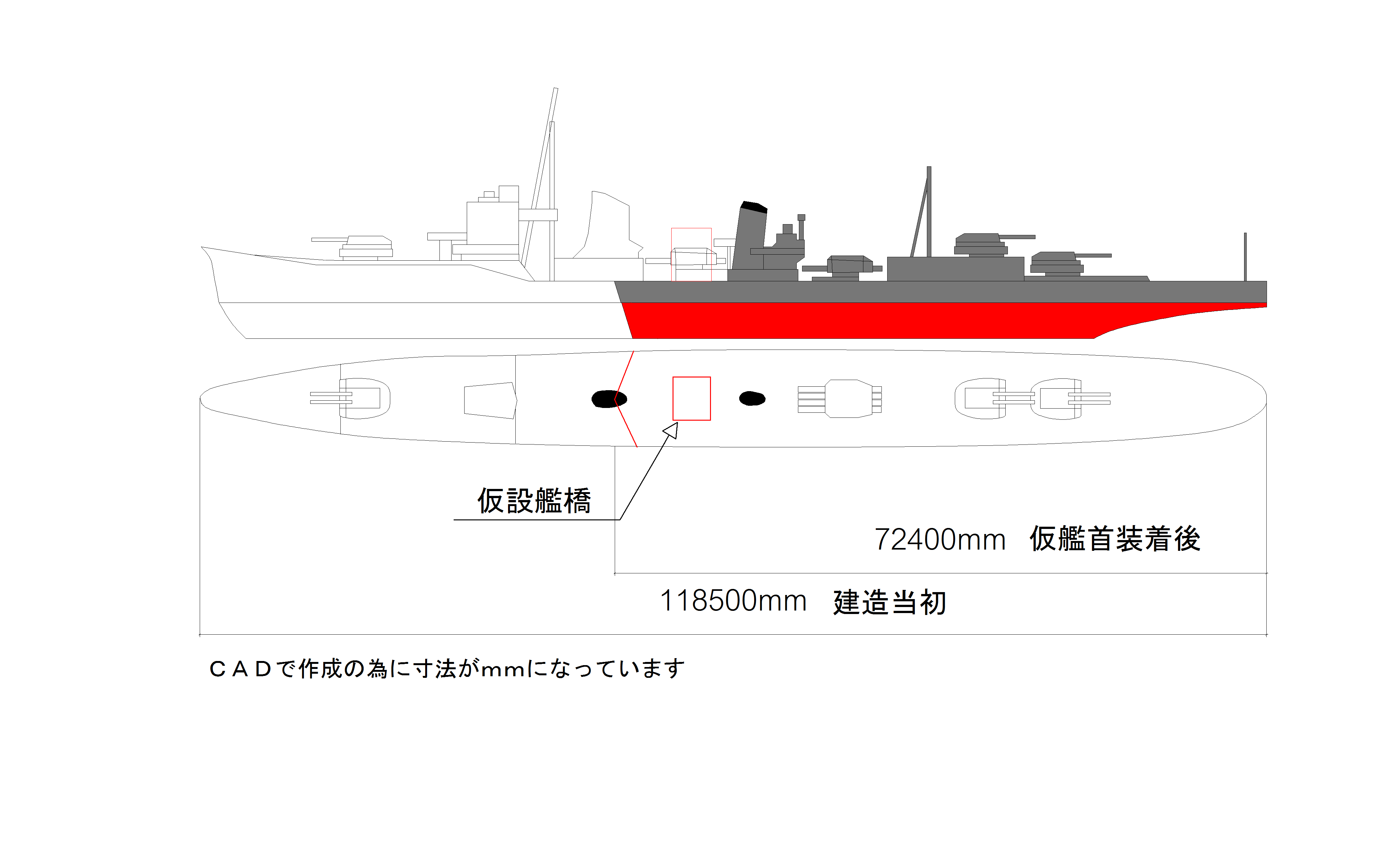 建造時、船体断裂後比較図